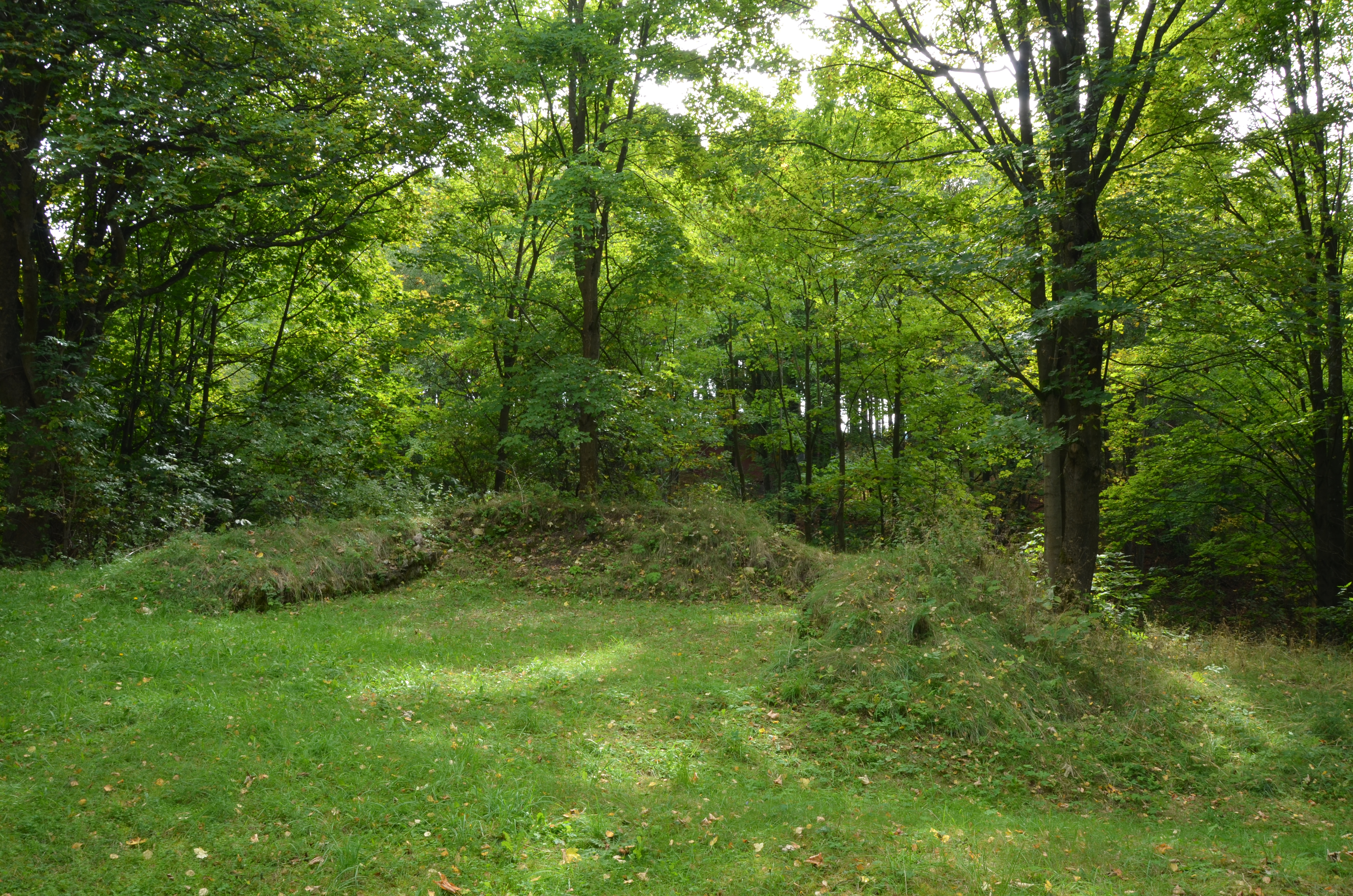 Úbočí - Hrad Borschengrün - zbytek původniho zdiva v severní části hradu